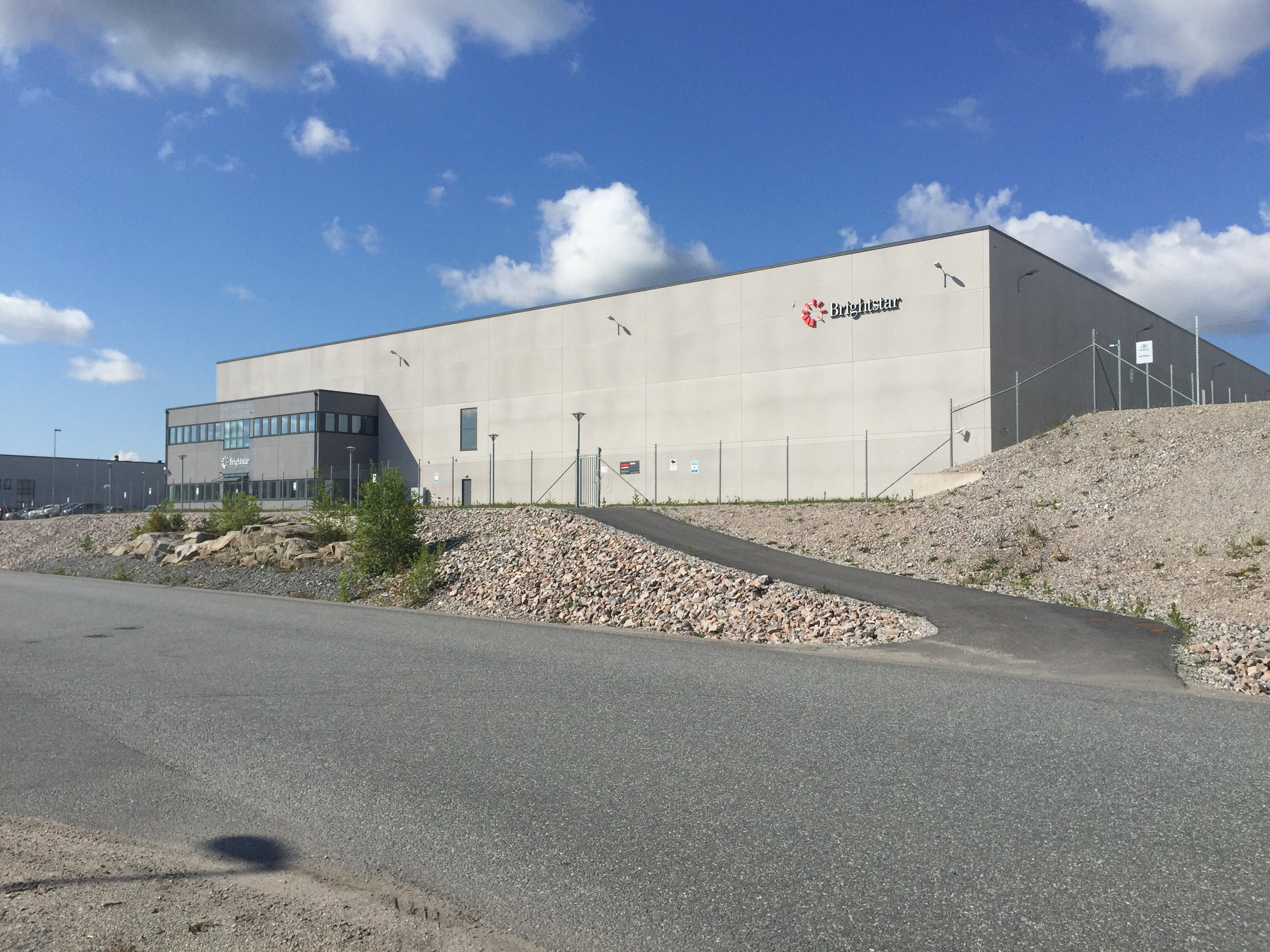 Rosersbergs industriområde